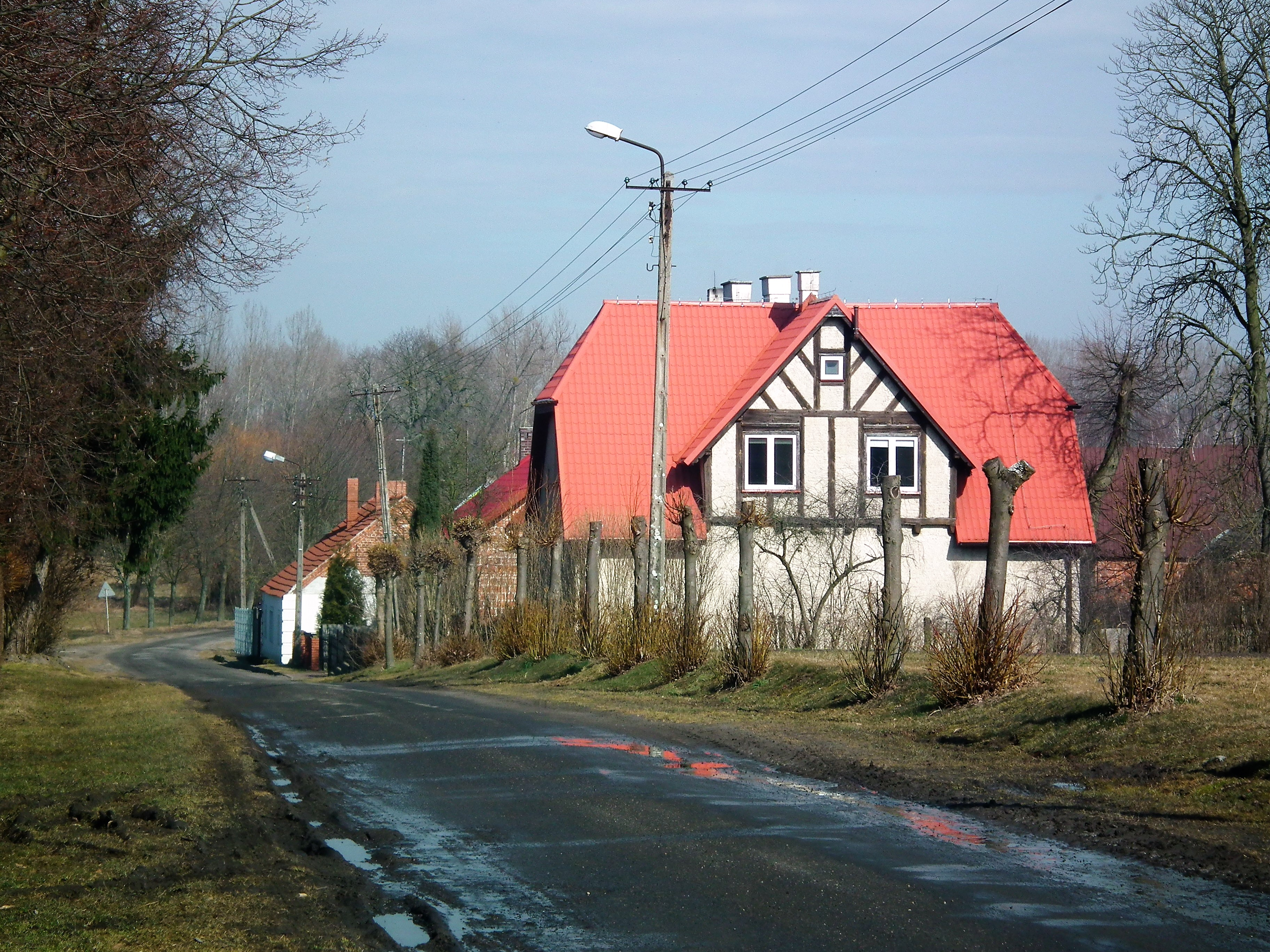 Kotusz - fragm. wsi.